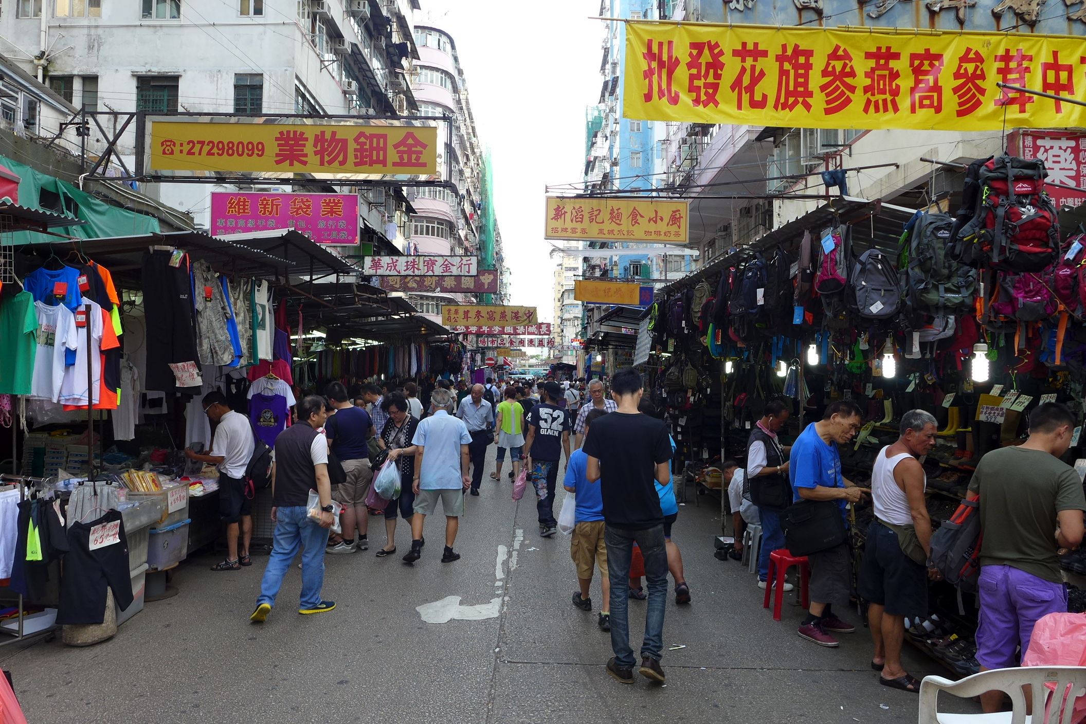 Pei Ho Street